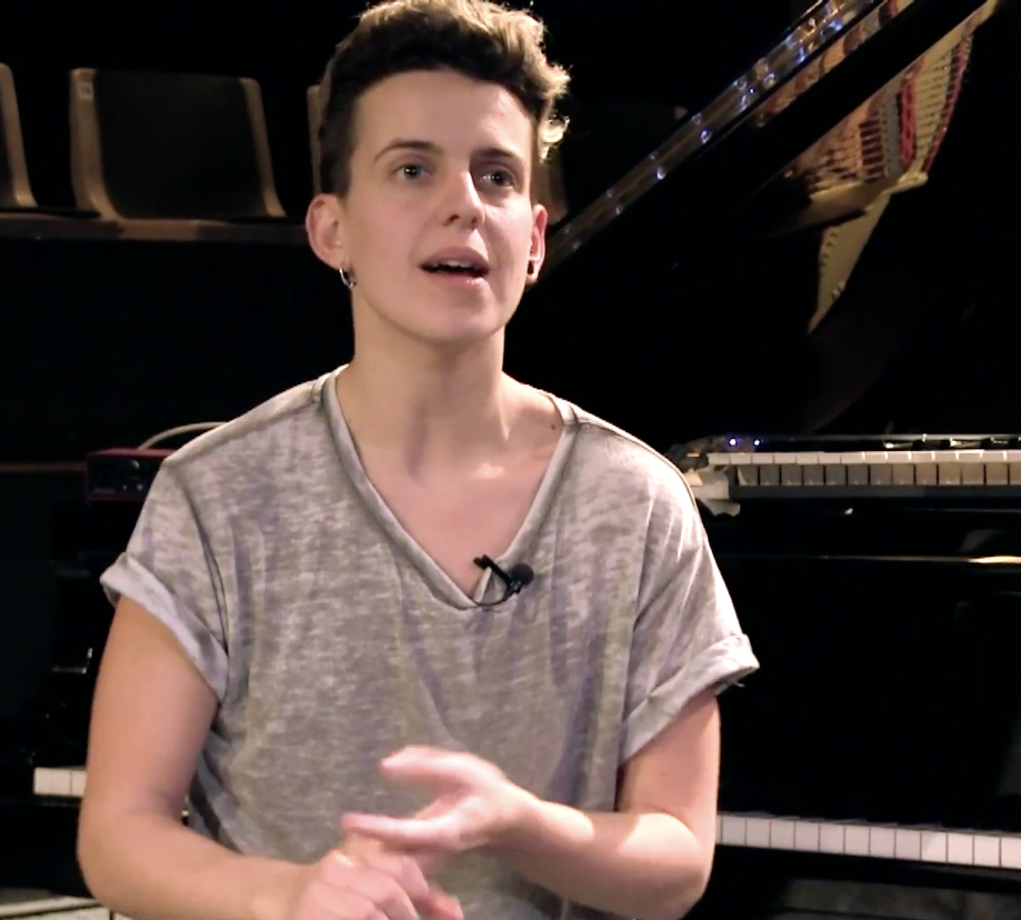 Clara Peya, intervjuad av idem tv, såsom pianist och medverkande i scenföreställningen "Limbo", på Teatre Gaudí (Barcelona), 15 februari 2015.